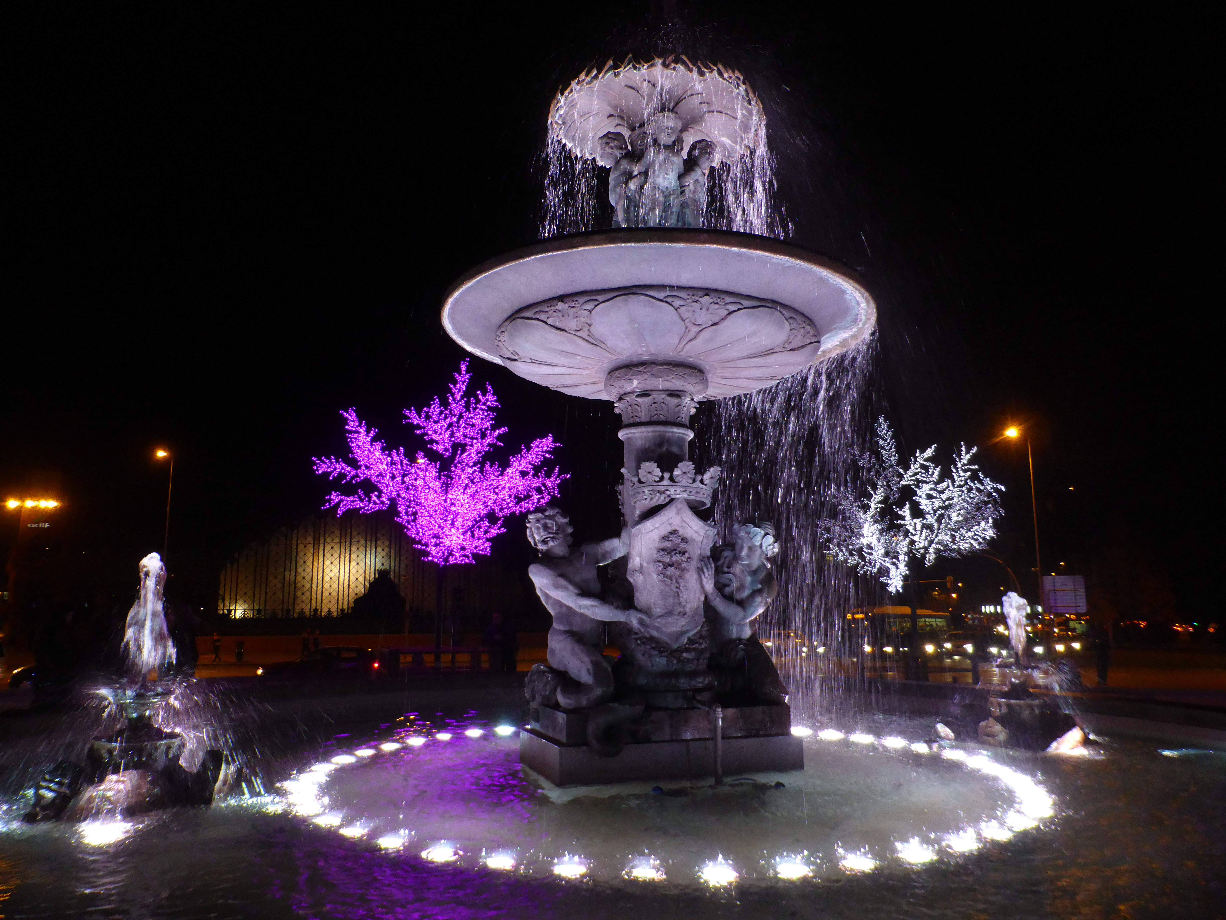 La plaza de Atocha (oficialmente del Emperador Carlos V) tiene esta fuente central rodeada por el tráfico de vehículos. La obra es una copia o réplica en bronce de la Fuente de la Alcachofa, del Parque del Retiro.